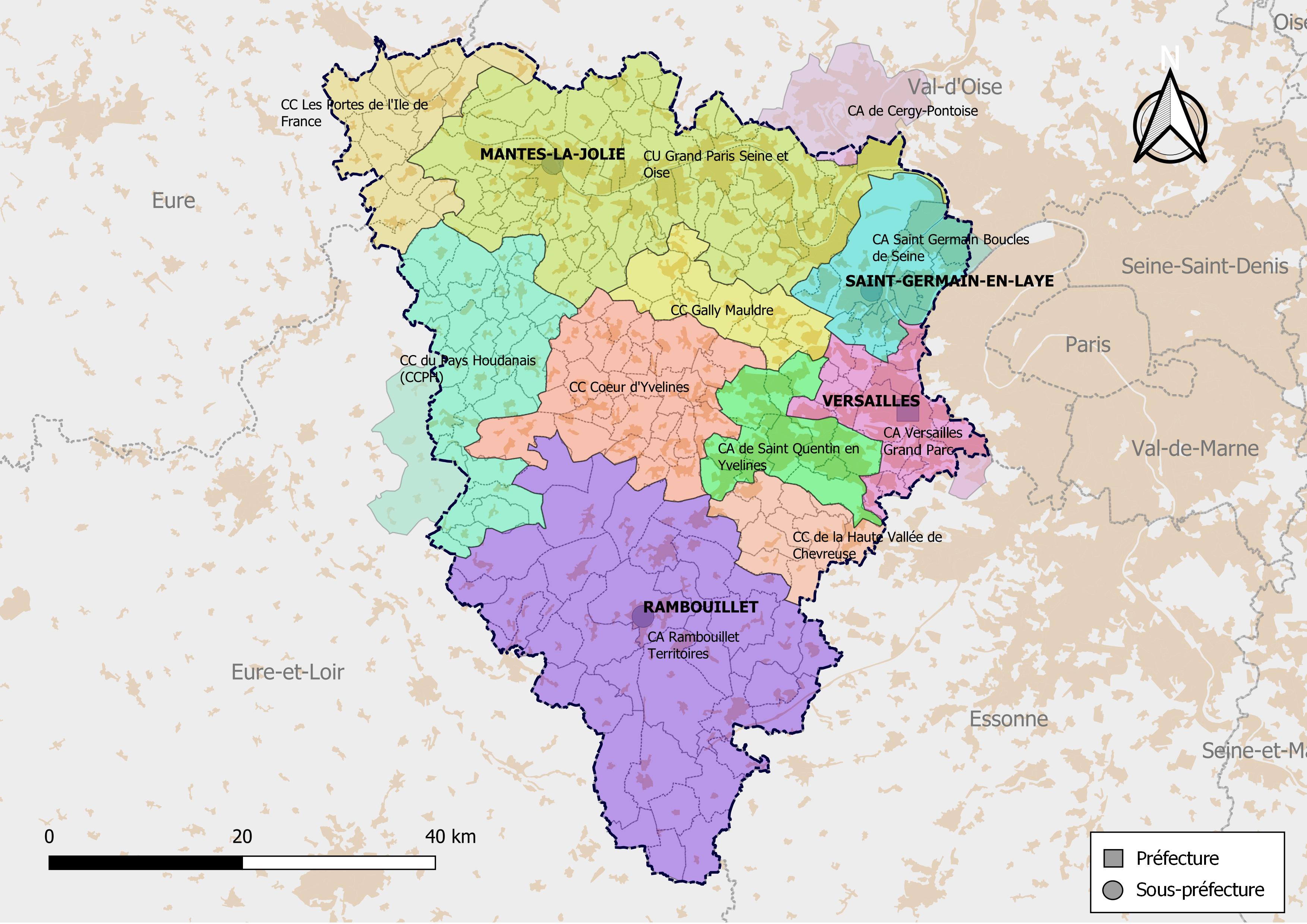 Carte des intercommunalités du département des Yvelines, France. Composition au 1er janvier 2019.